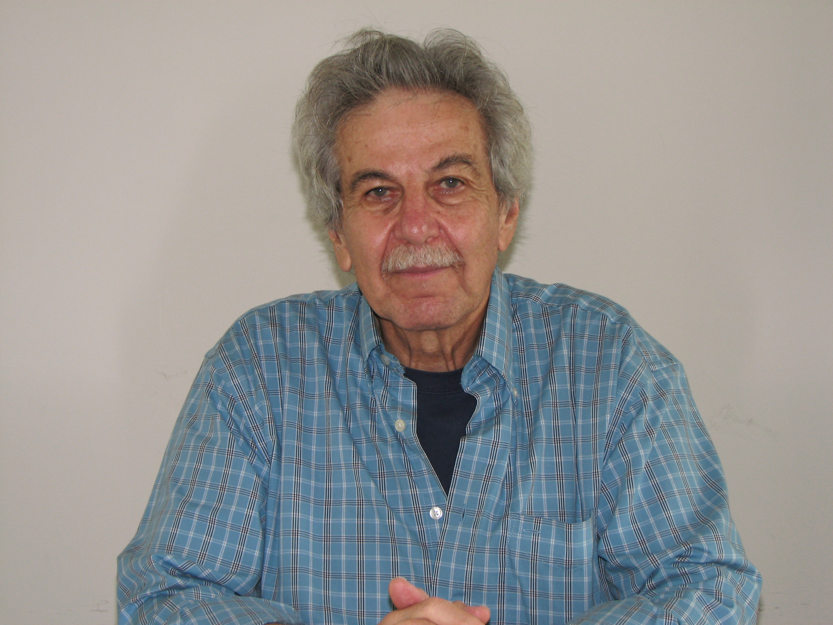 Foto van Howard Rachlin uit 2007